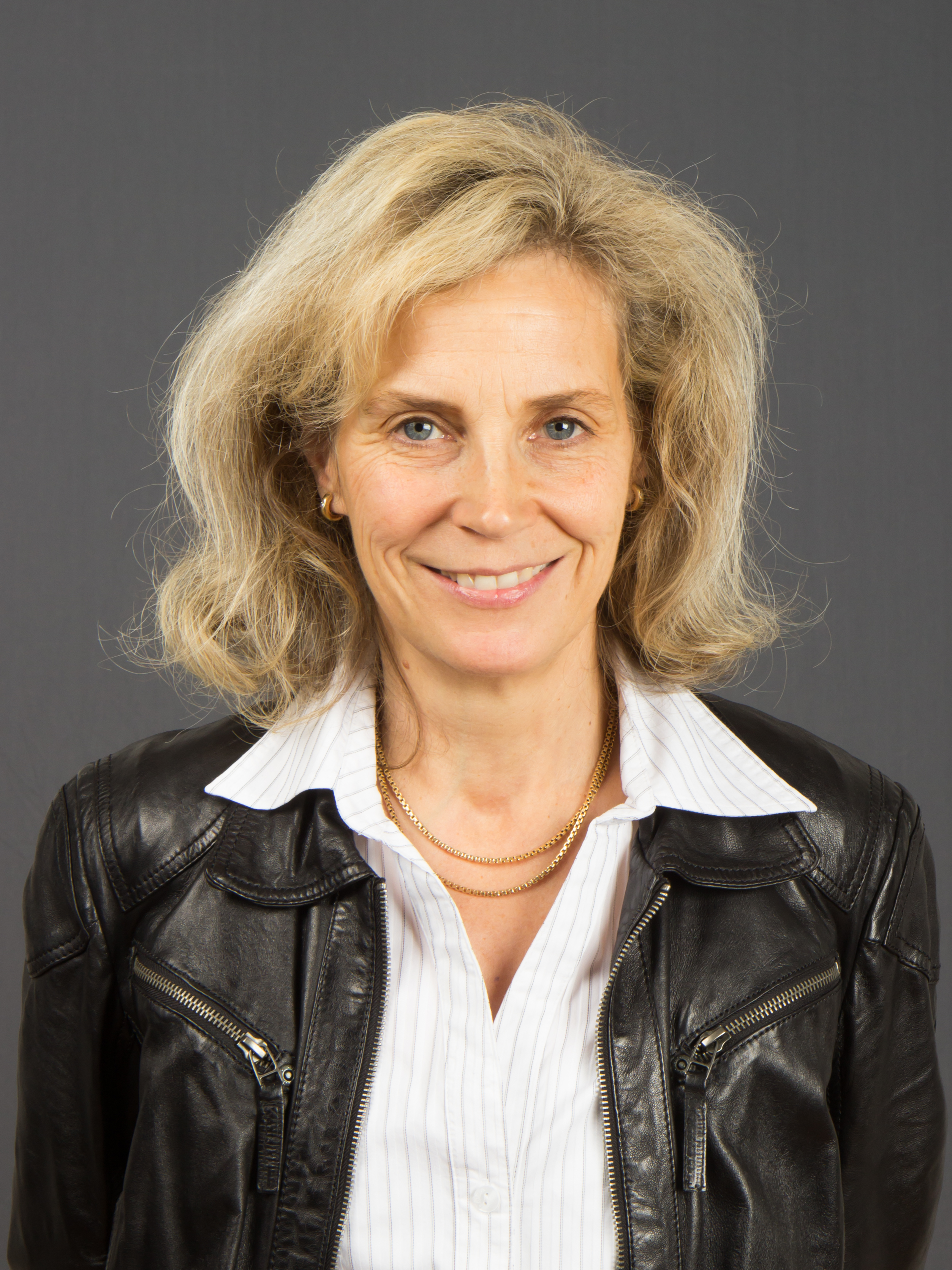 Die rheinland-pfälzische Landtagsabgeordnete Anna Köbberling